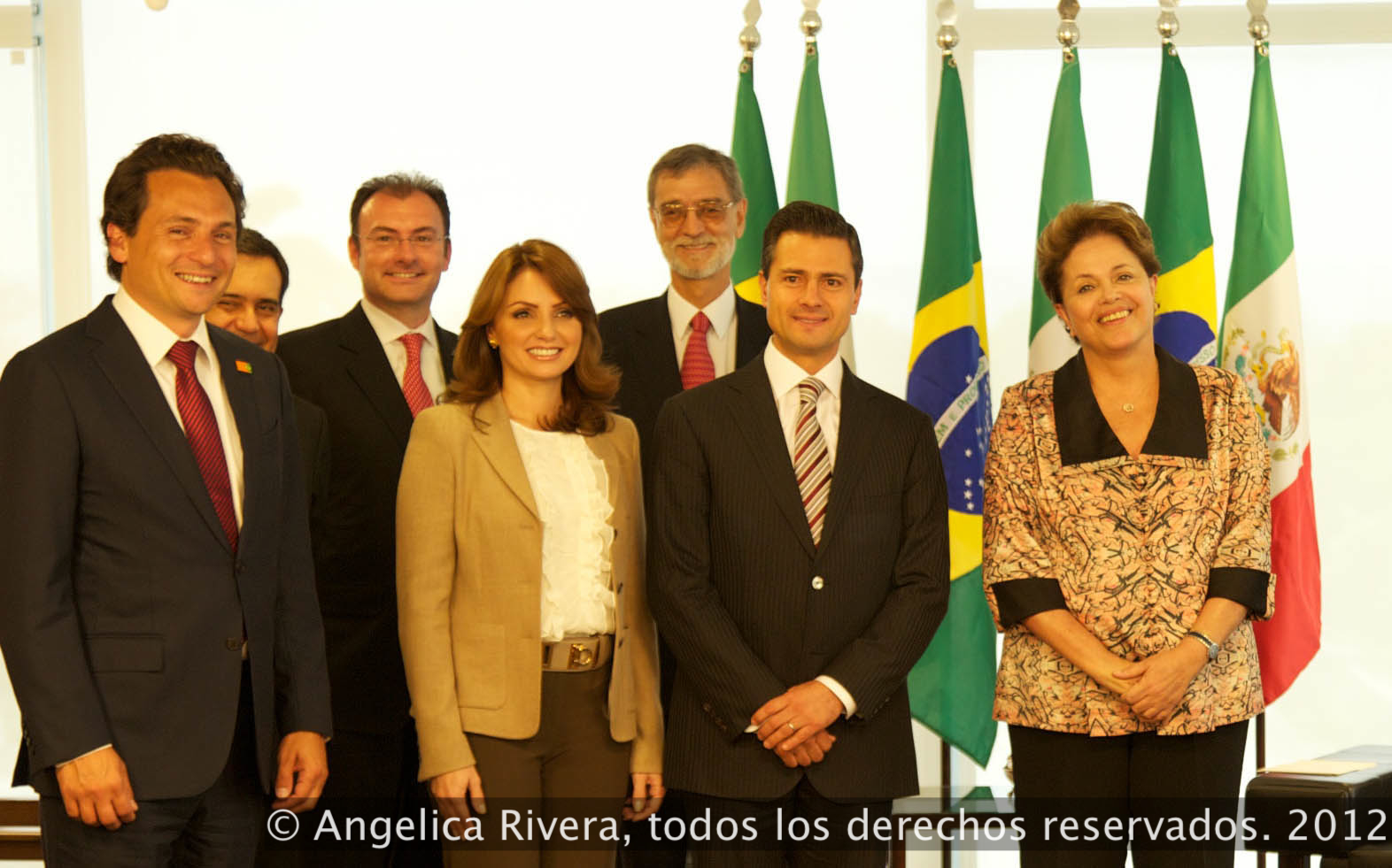 Gira por Centro y Sudamérica - Reunión con la Presidenta de Brasil, Dilma Rousseff. Brasilia, Brasil. 20 de Septiembre del 2012.